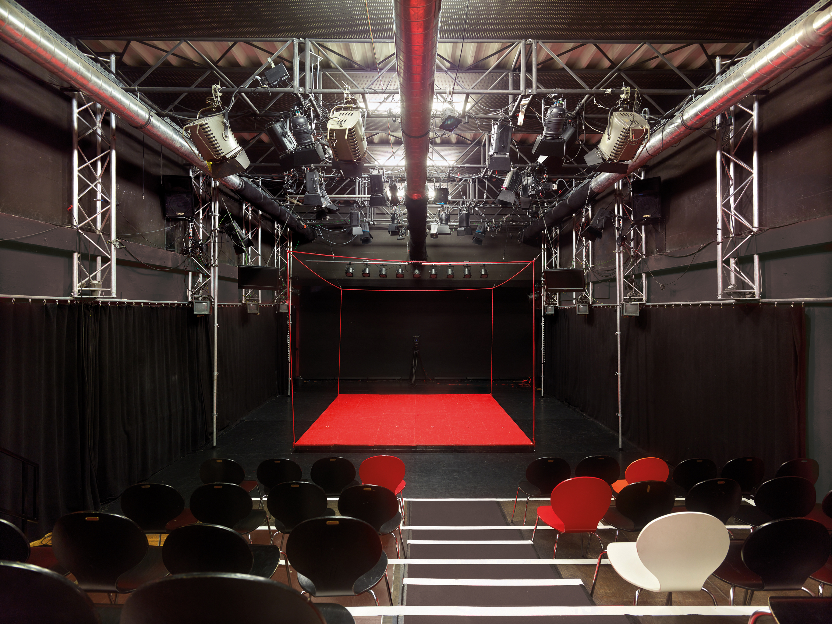 Theatersaal des monsun.theaters